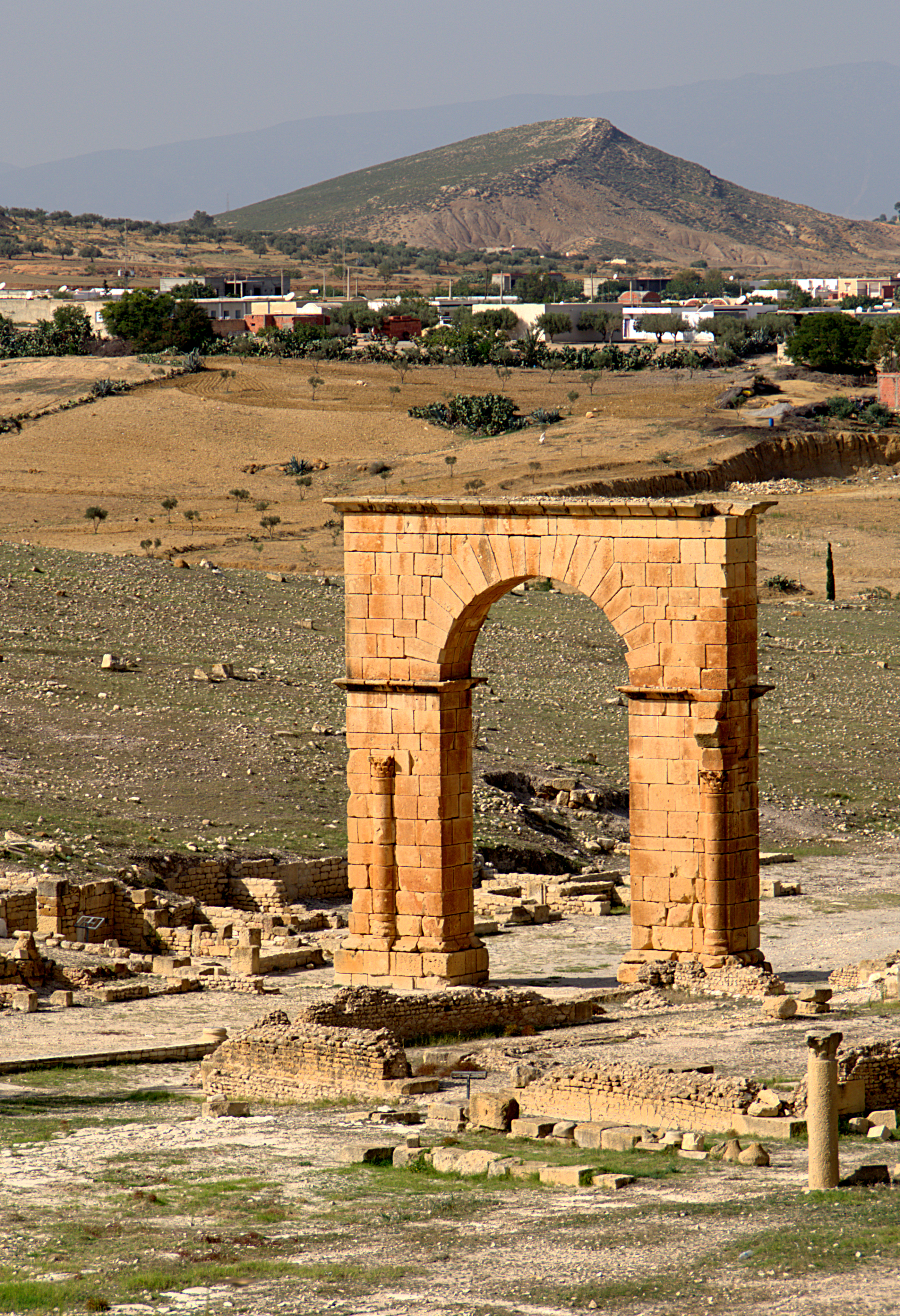 Porte triomphale, Sidi Khelifa